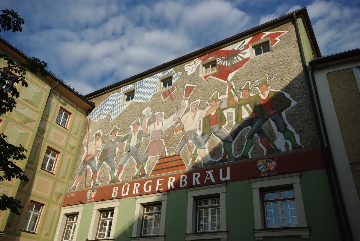 Wandmalerei Bürgerbräu Bad Reichenhall, Waaggasse